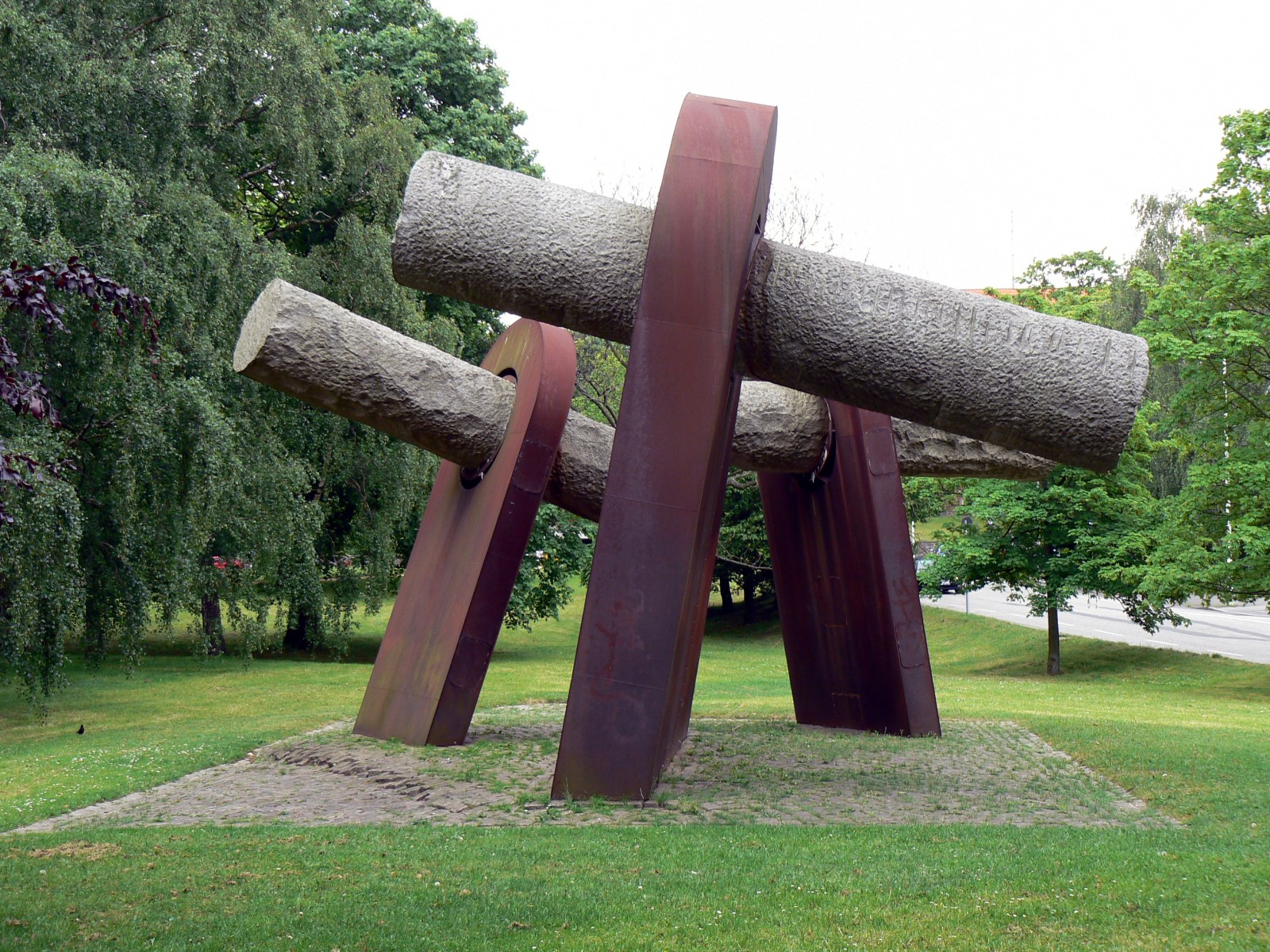 Skulptur Wik in Kiel. Künstler: Hans-Jürgen Breuste (1978-82), Granit und Cor-Ten-Stahl, Standort: Ratsdienergarten in Kiel. Es ist ein künstlerisches Zeichen zur "Erinnerung an Ereignisse im November 1918" in Kiel (Kieler Matrosenaufstand).